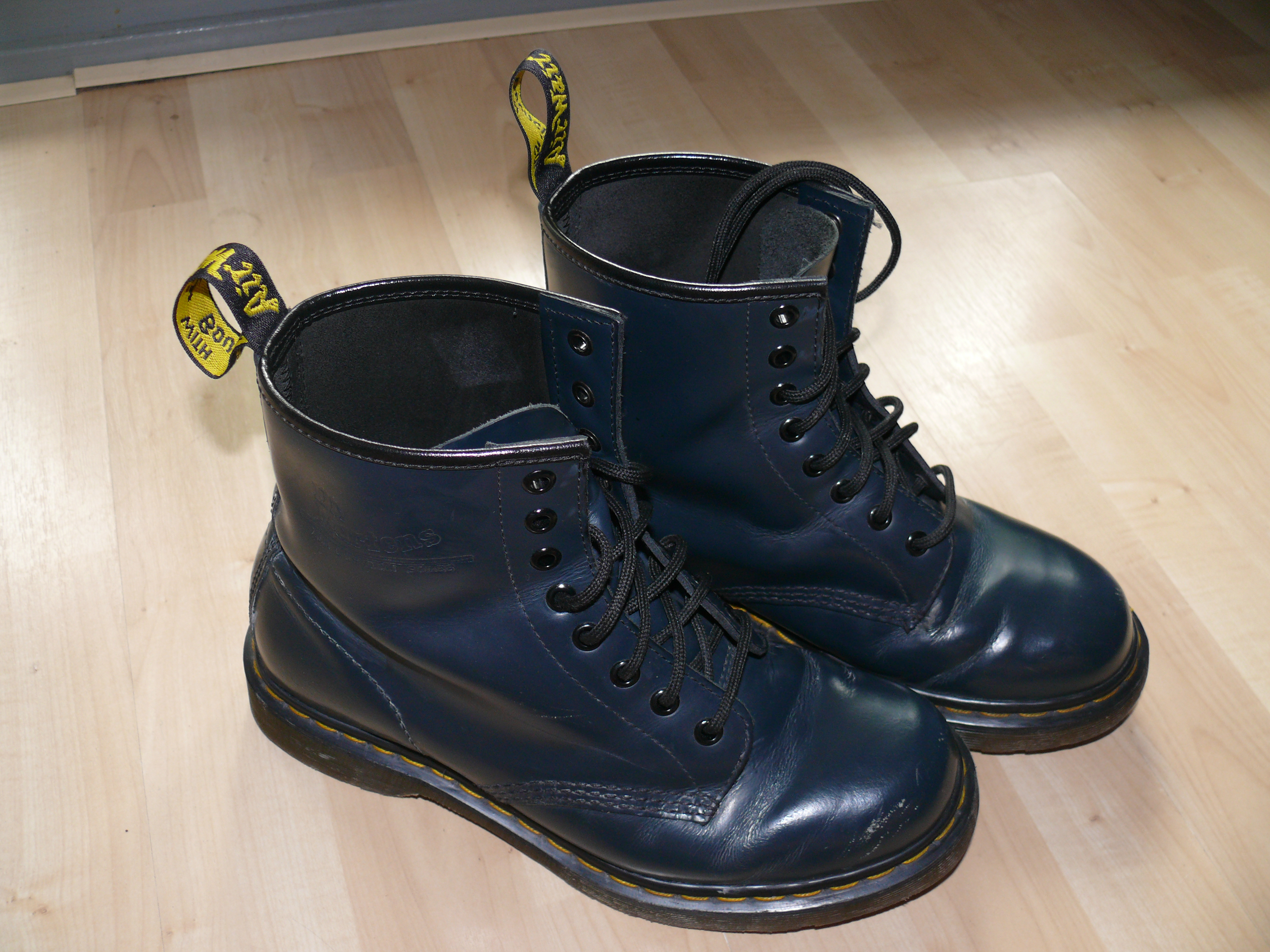 Ein paar Doc Martens in Navy-Blau, made in Thailand